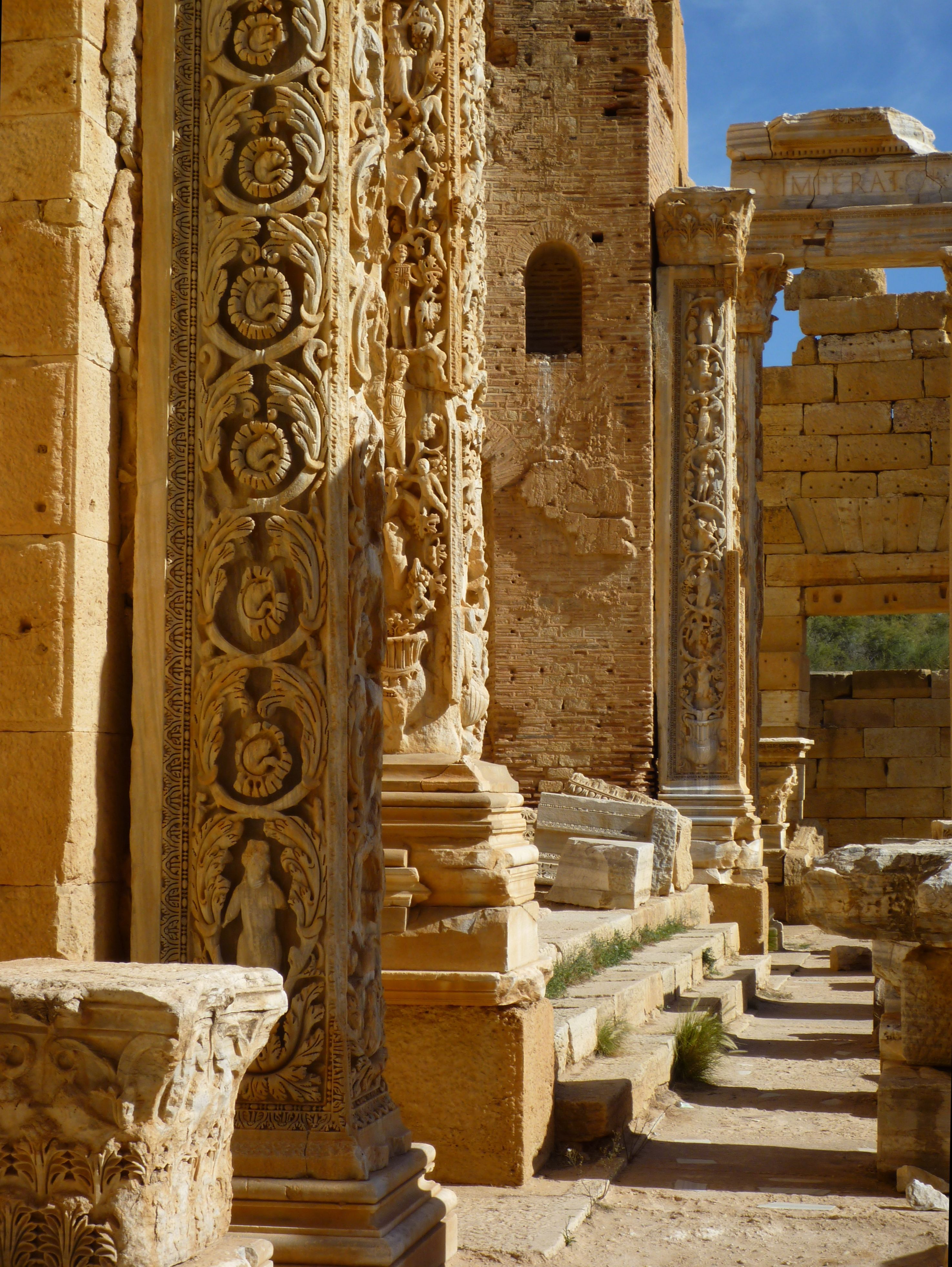 Leptis Magna - Severan Basilika, Reliefpfeiler